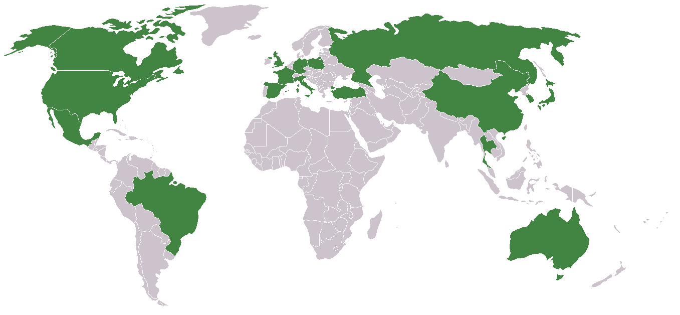 Staaten mit einem Kraftfahrzeugbestand von über 10 Millionen PKW + LKW